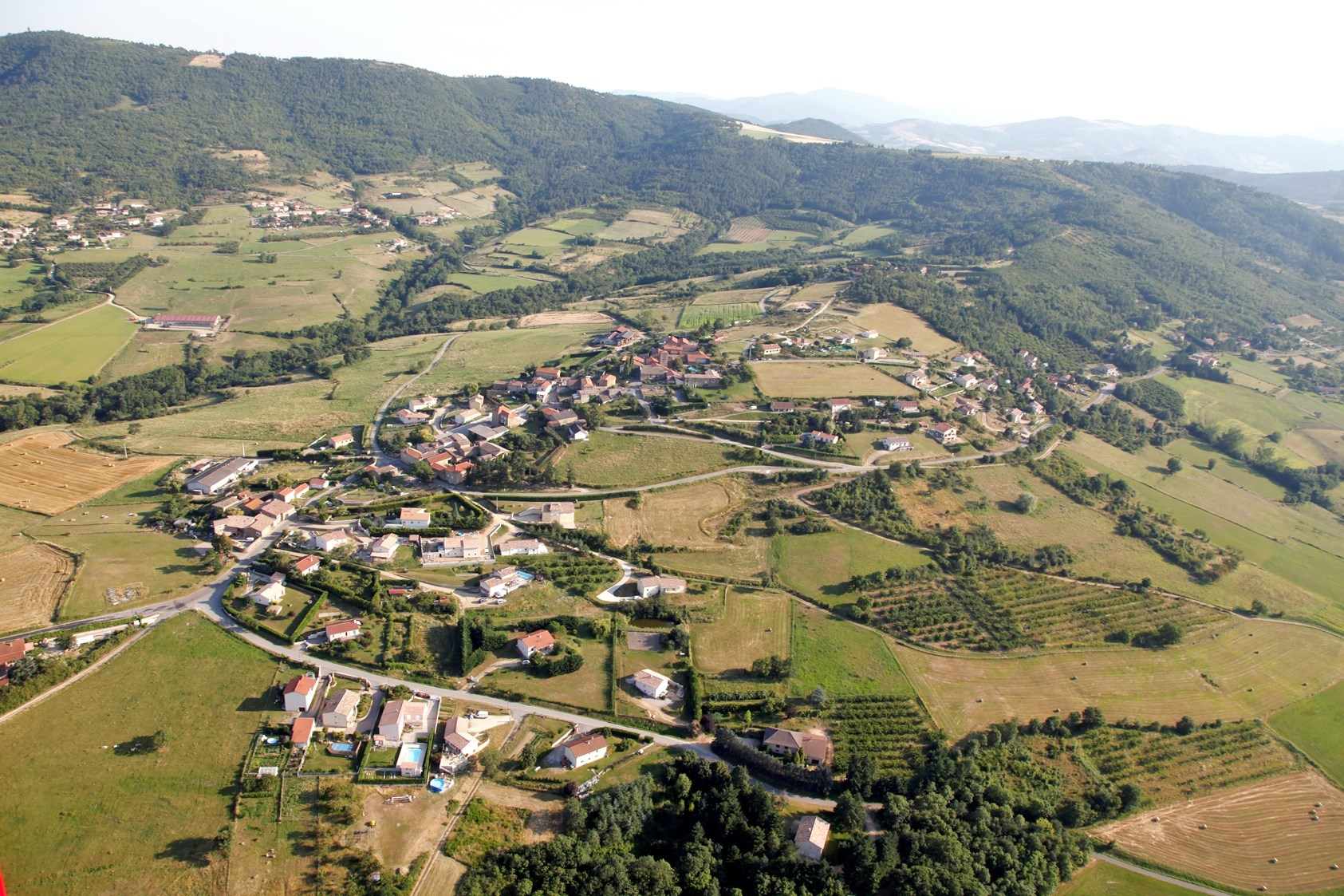 Saint-Jacques-d'Atticieux détail